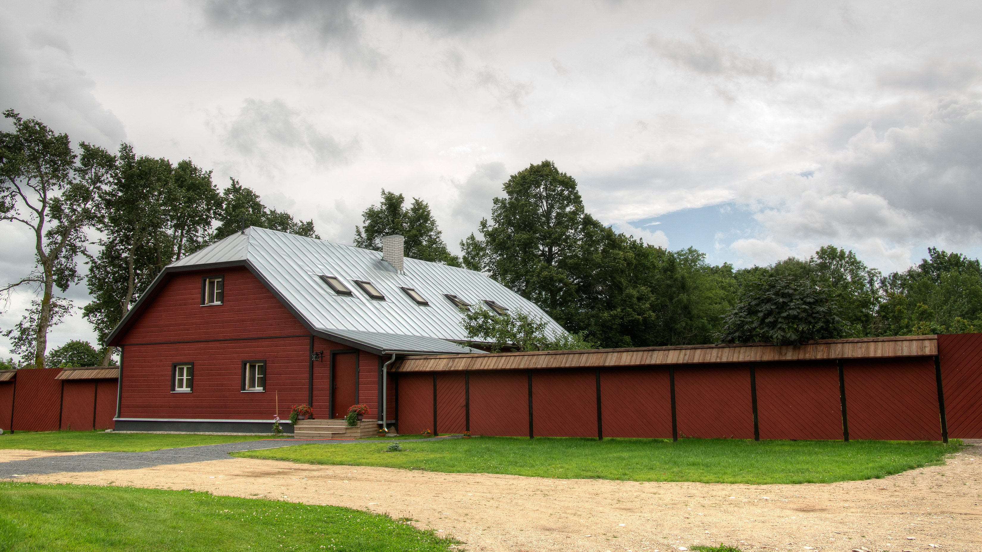 Püha Eelkäija Skiita uus kloostrihoone Reo külas Saaremaal